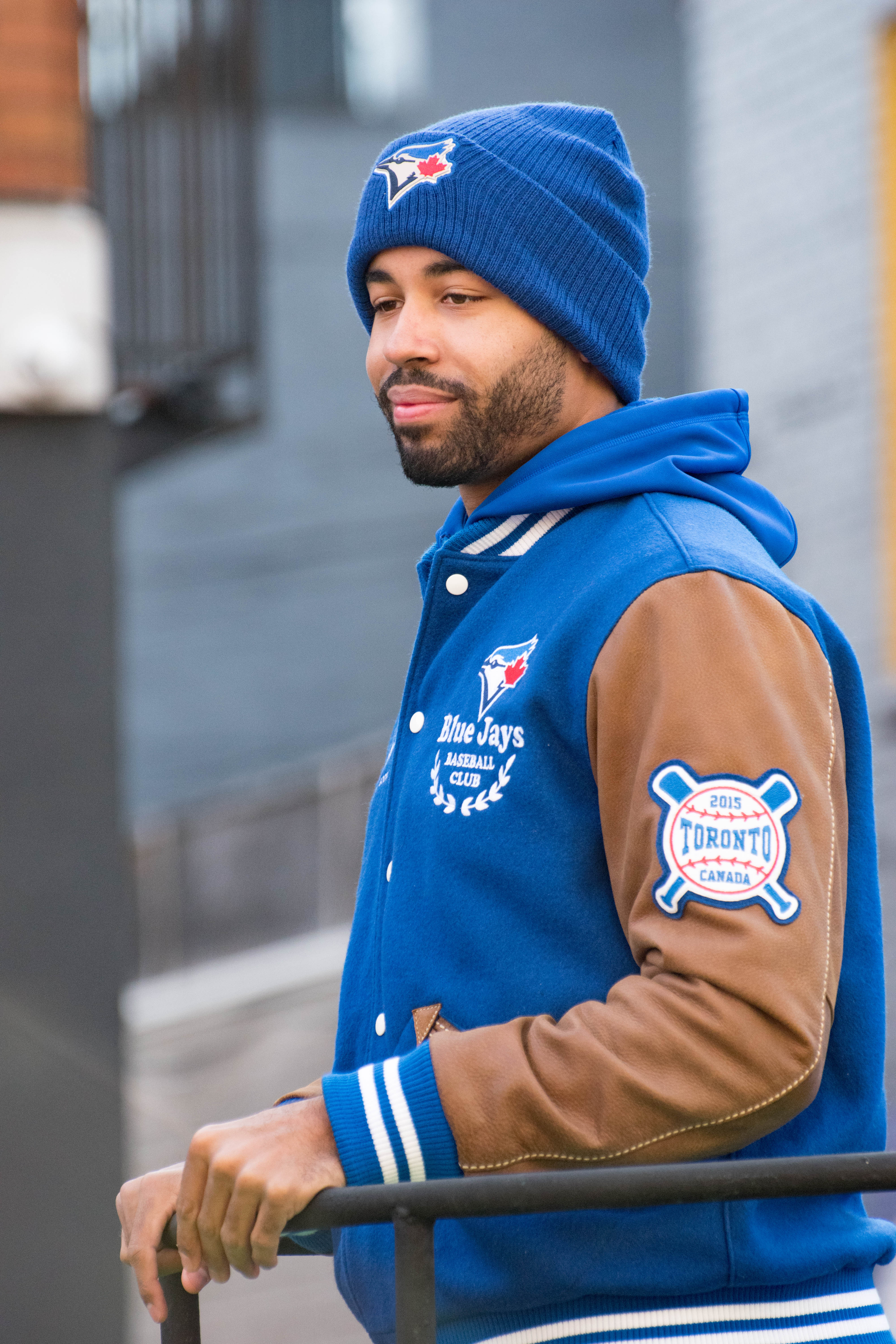 Santa Claus Parade (Toronto)